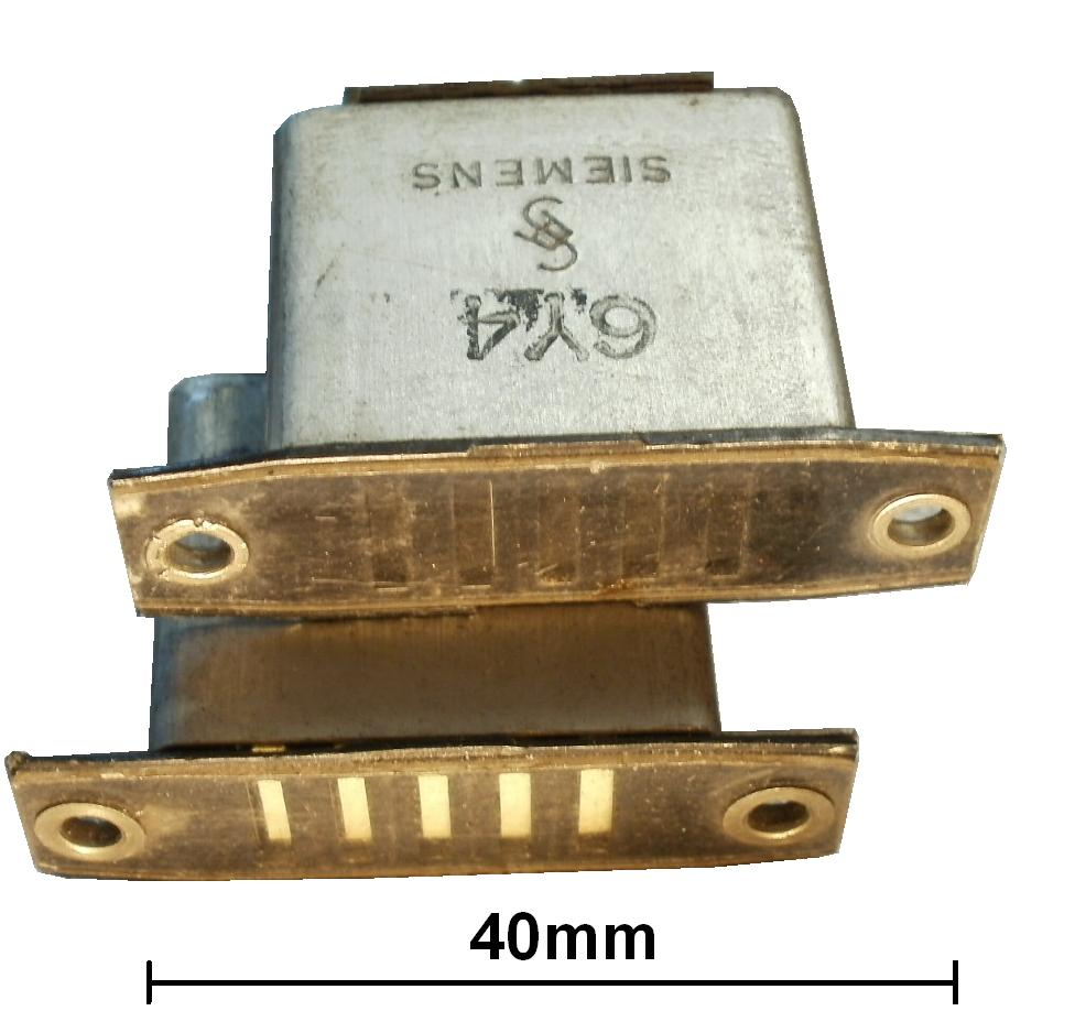 Streifen-Schauzeichen Telefonvermittlung oben: Ruhezustand unten: erregt